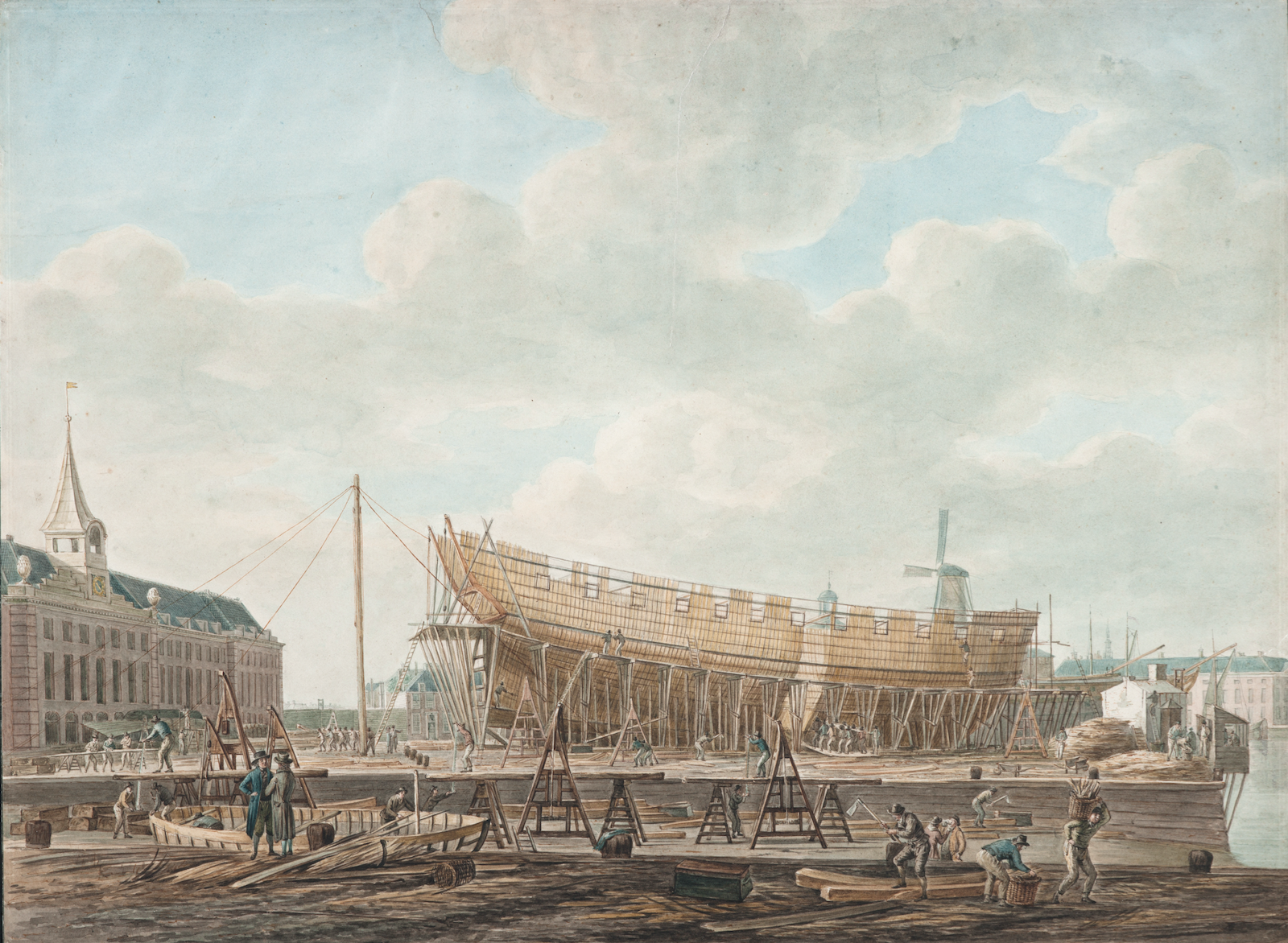 Het terrein van de Marinewerf (’s Lands werf) met links het magazijn. Op de helling is een schip in aanbouw.